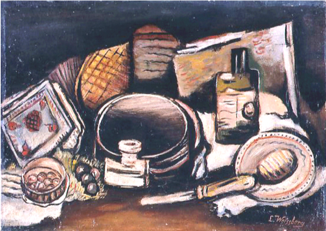 Tableau Nature morte à l’encrier, de Léon Weissberg